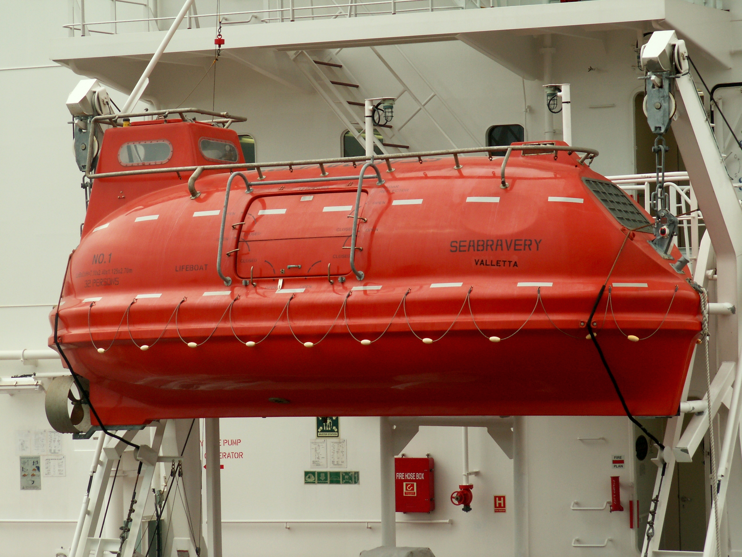 Seabravery NO.1 rescue vessel 01-Sep-2005.